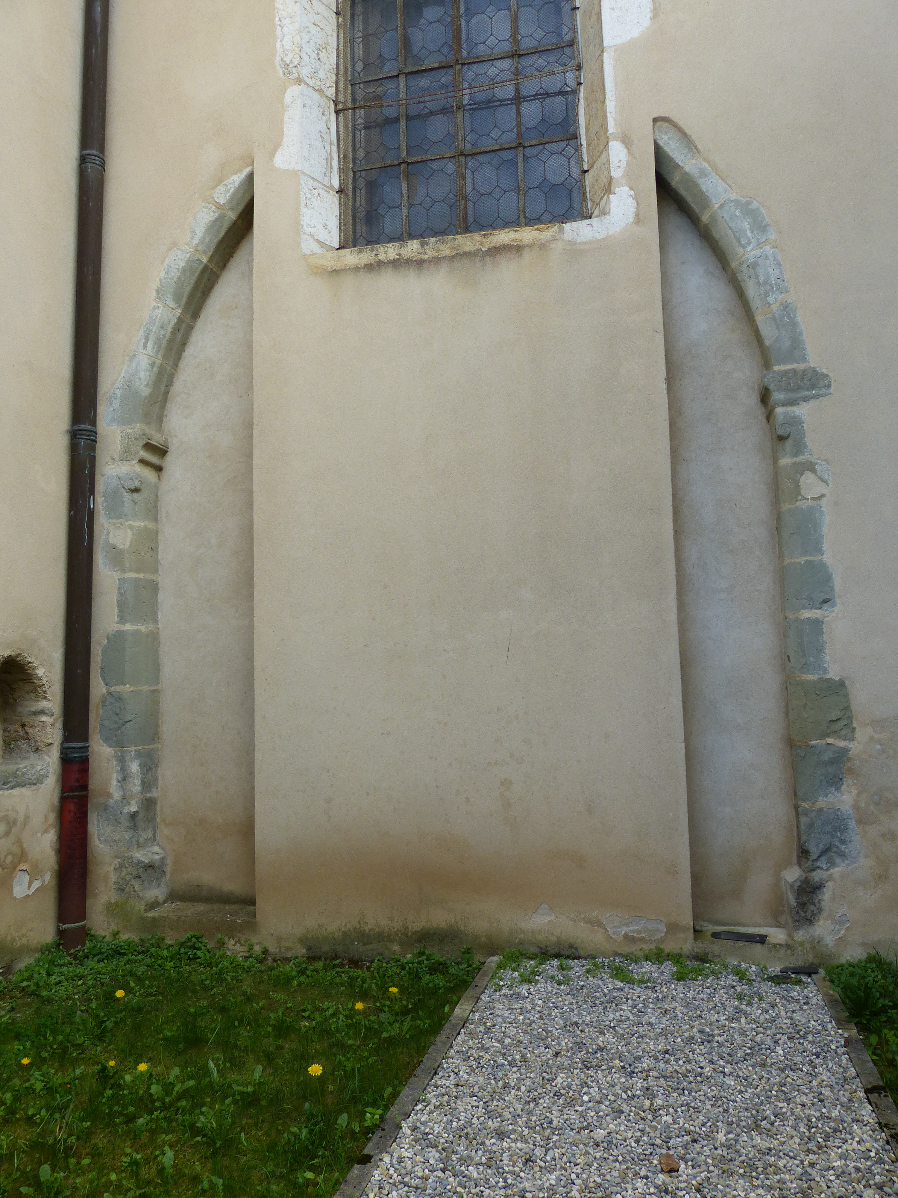 Abbaye d'Hautecombe - Arc extérieur marquant la seule trace subsistante de la chapelle de Chevelu, où étaient enterrés les nobles de cette famille, s'ouvrant sur le bas-côté nord et donnant sur la cour Saint-André. La chapelle était située entre le transept septentrional et l'actuelle chapelle Saint-Félix.